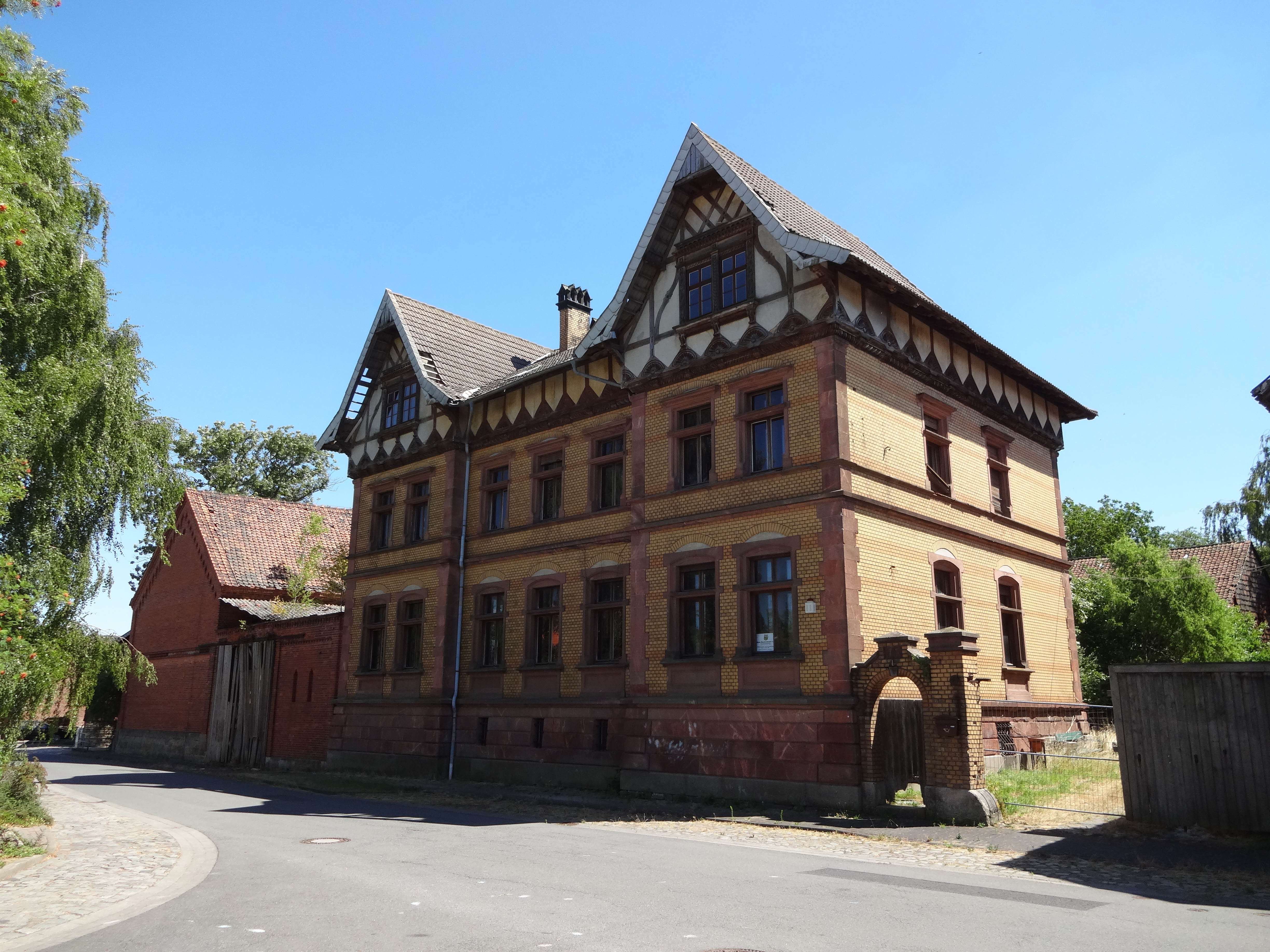 denkmalgeschütztes Bauernhaus in der Straße Im Pfeilern 1 in Dedeleben